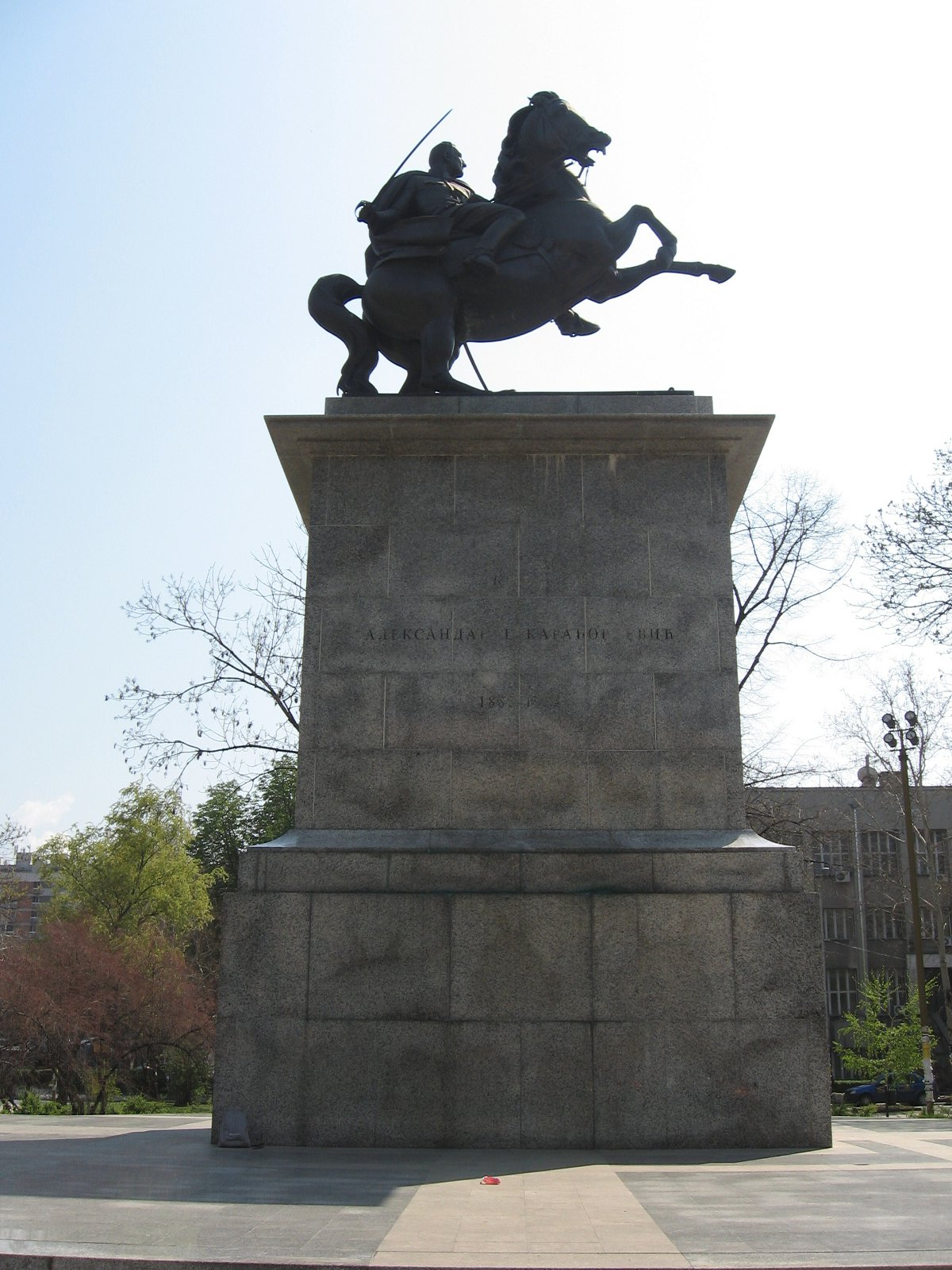 Споменик Краљу Александру на Тргу Краља Александра. Снимљено у априлу 2010.